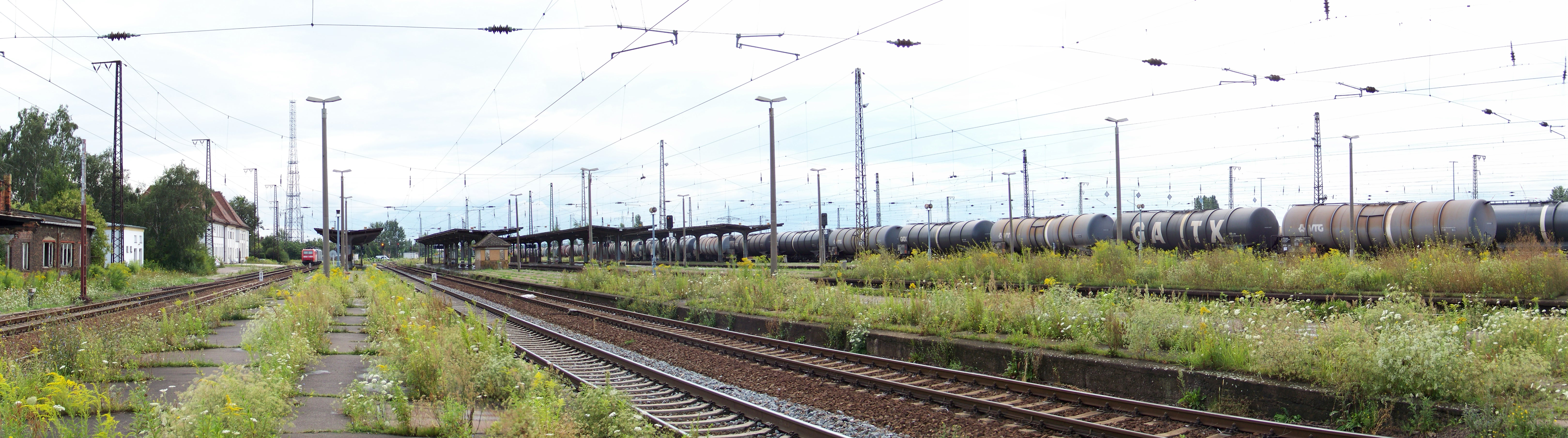 Panoramaansicht des Bahnhofs Großkorbetha